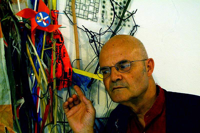 Der emeritierte Professor Frank Popp, Mitglied der "Gruppe 7" sowie der Künstlergruppe "arche", hier vor seiner Installation "Hallo, Kurt Schwitters, jetzt zeige ich dir meine neuste Sammlung, den letzten Dreck vom Expo-Gelände..."; per Fingerzeig 2012 im SofaLoft während des 15. Zinnober-Kunstvolkslaufes ...